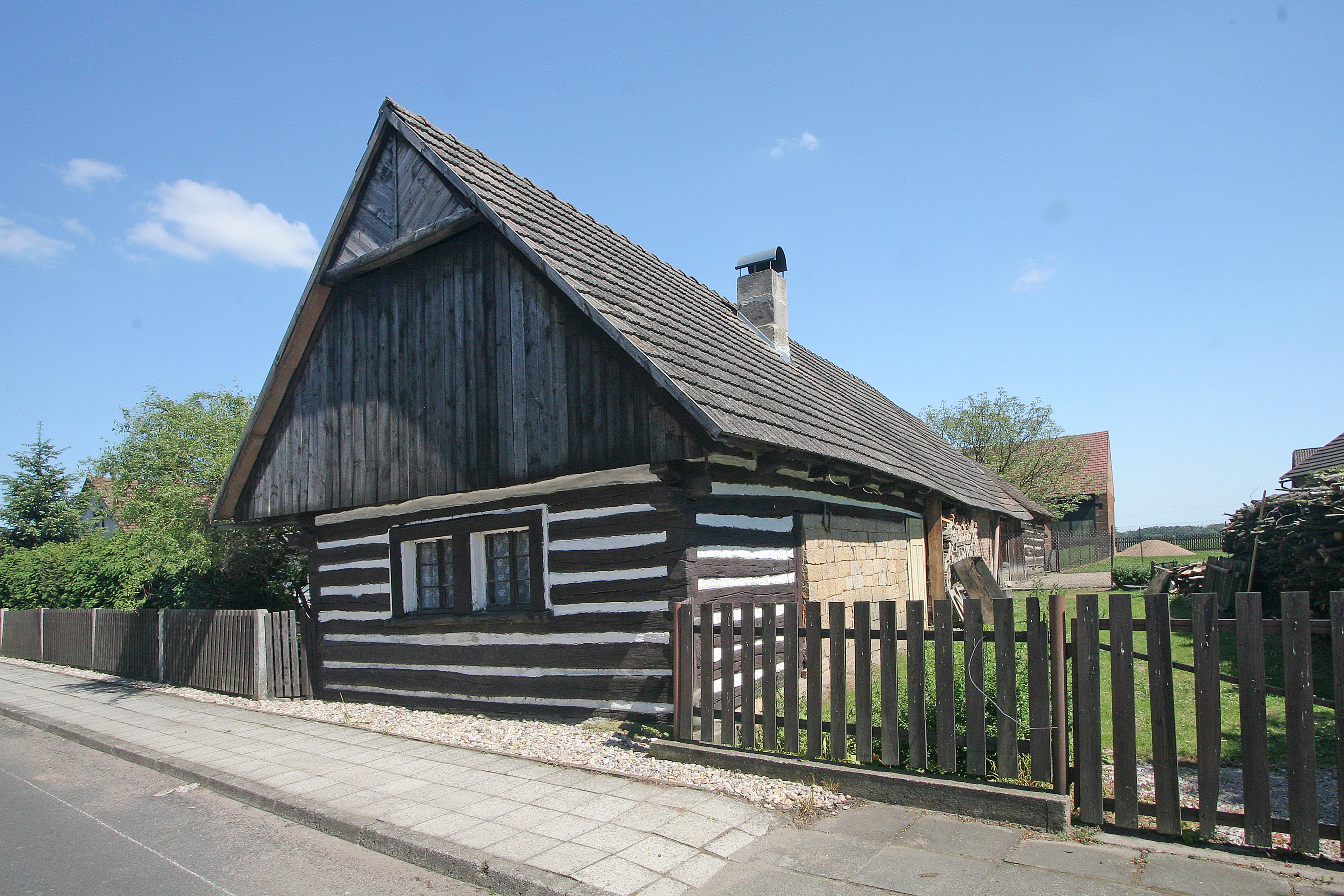 Sukorady čp. 6